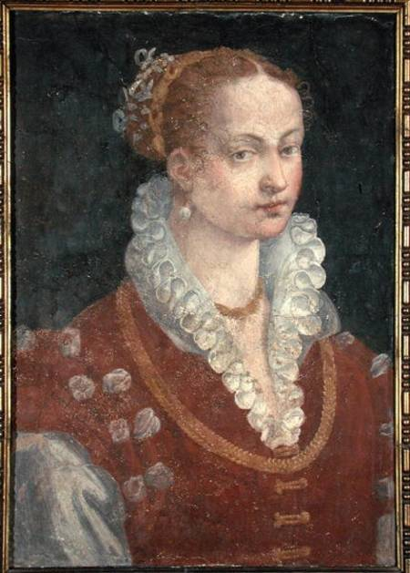 Isabella de' Medici, figlia di Cosimo I